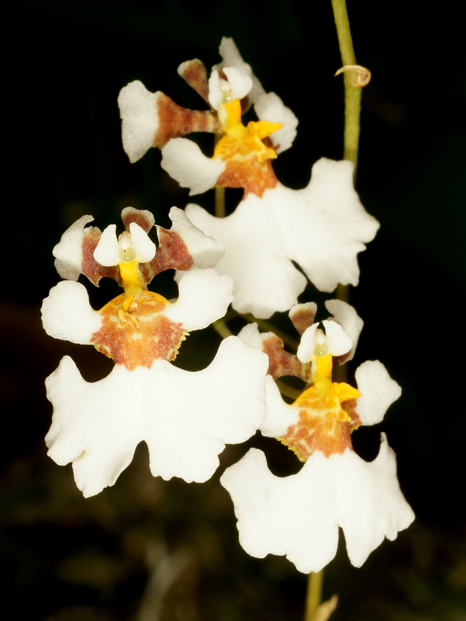 Tolumnia variegata